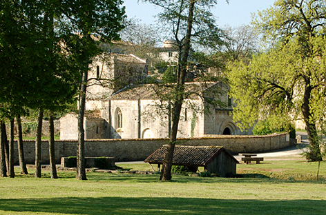 le lavoir, l'église et le cimetière ancien